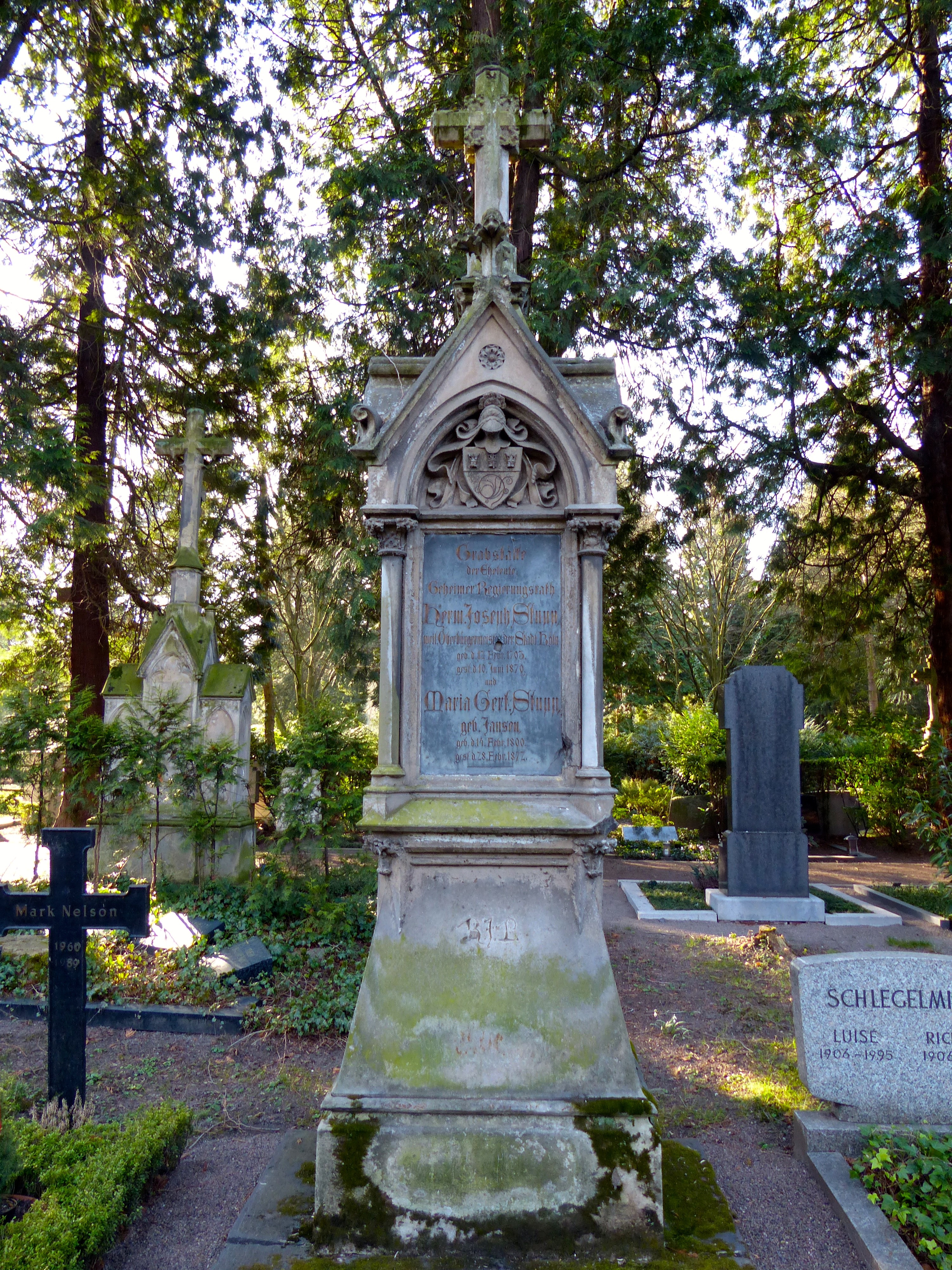 Grabstelle auf dem Melaten-Friedhof: Hermann Joseph Stupp (* 12. Februar 1793 in Golzheim (Hüttenhof); † 10. Juni 1870 in Köln) war von 1851 bis 1863 Oberbürgermeister der Stadt Köln.